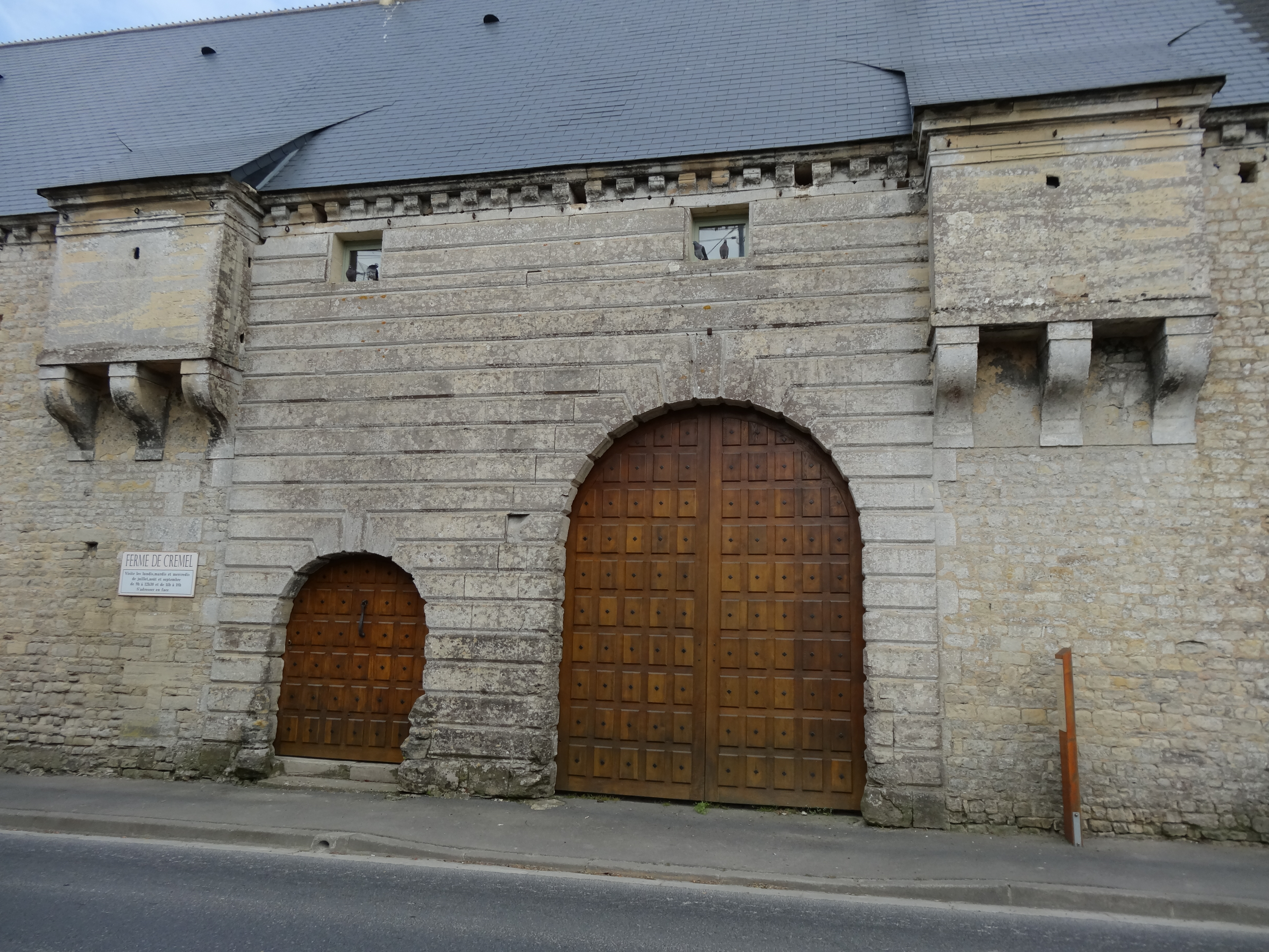 Château de Crémel, Crémel (Inscrit, 19282012_UNIQ3cd499a227ce8c45-ref-00000016-QINU_) porche monumental comportant une porte charretière , une porte piétonnière et deux bretèches .